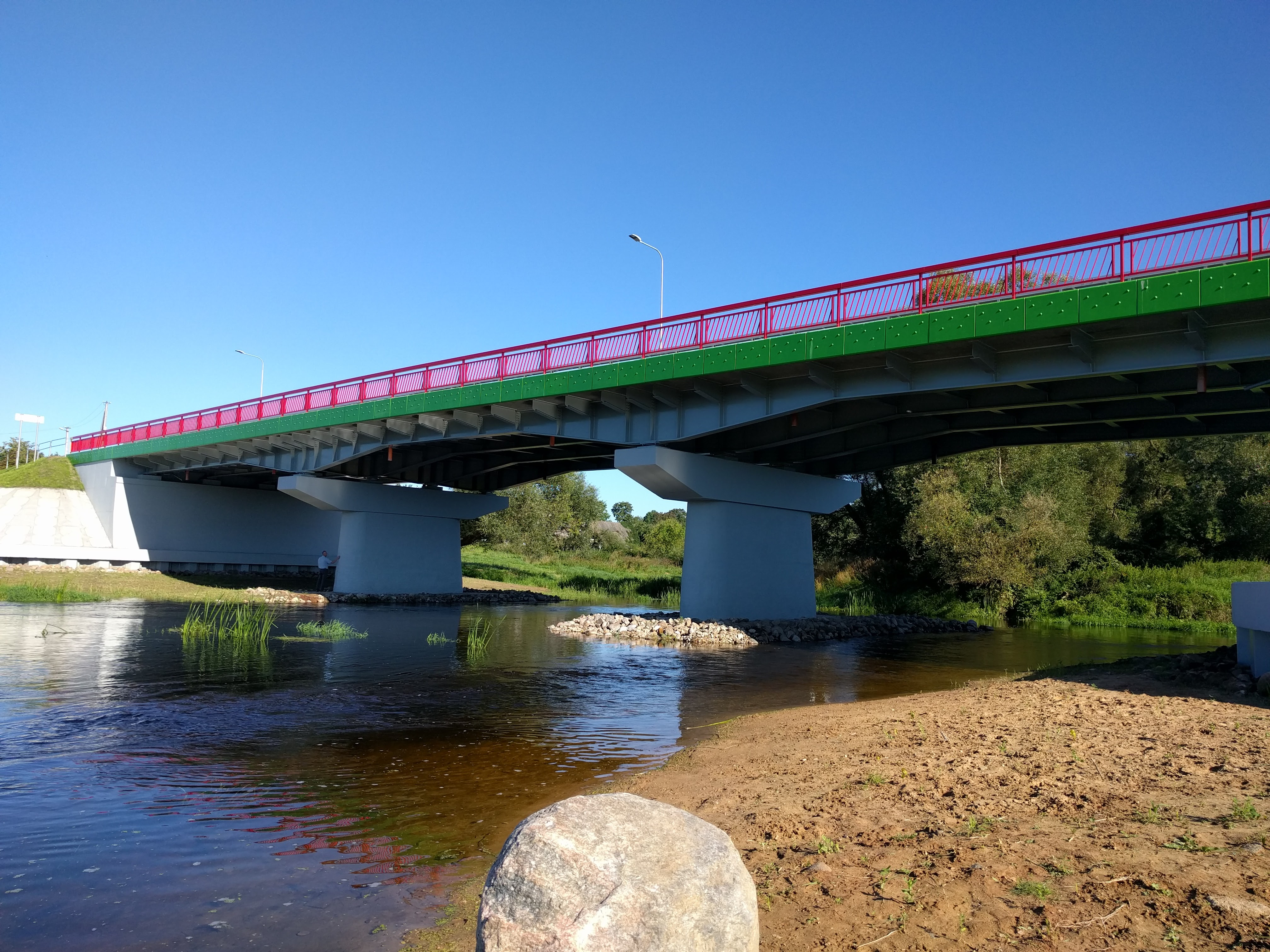 Tiltas per Nevėžį Krekenavoje po rekonstrukcijos